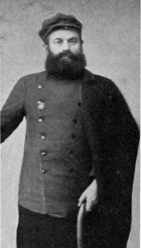 Анастас Янков